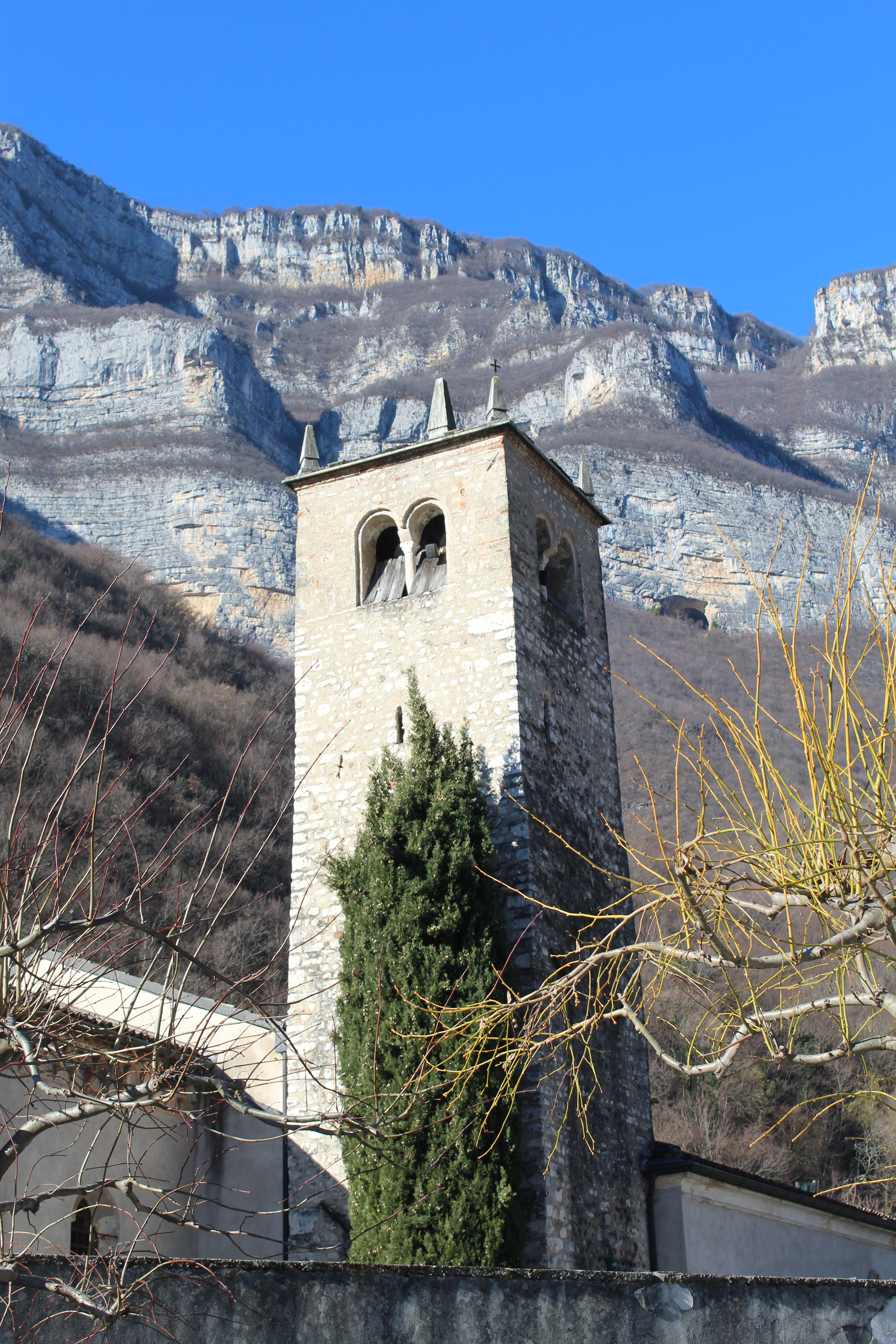 Interno della pieve di Avio (o chiesa dell'Immacolata), provincia di Trento